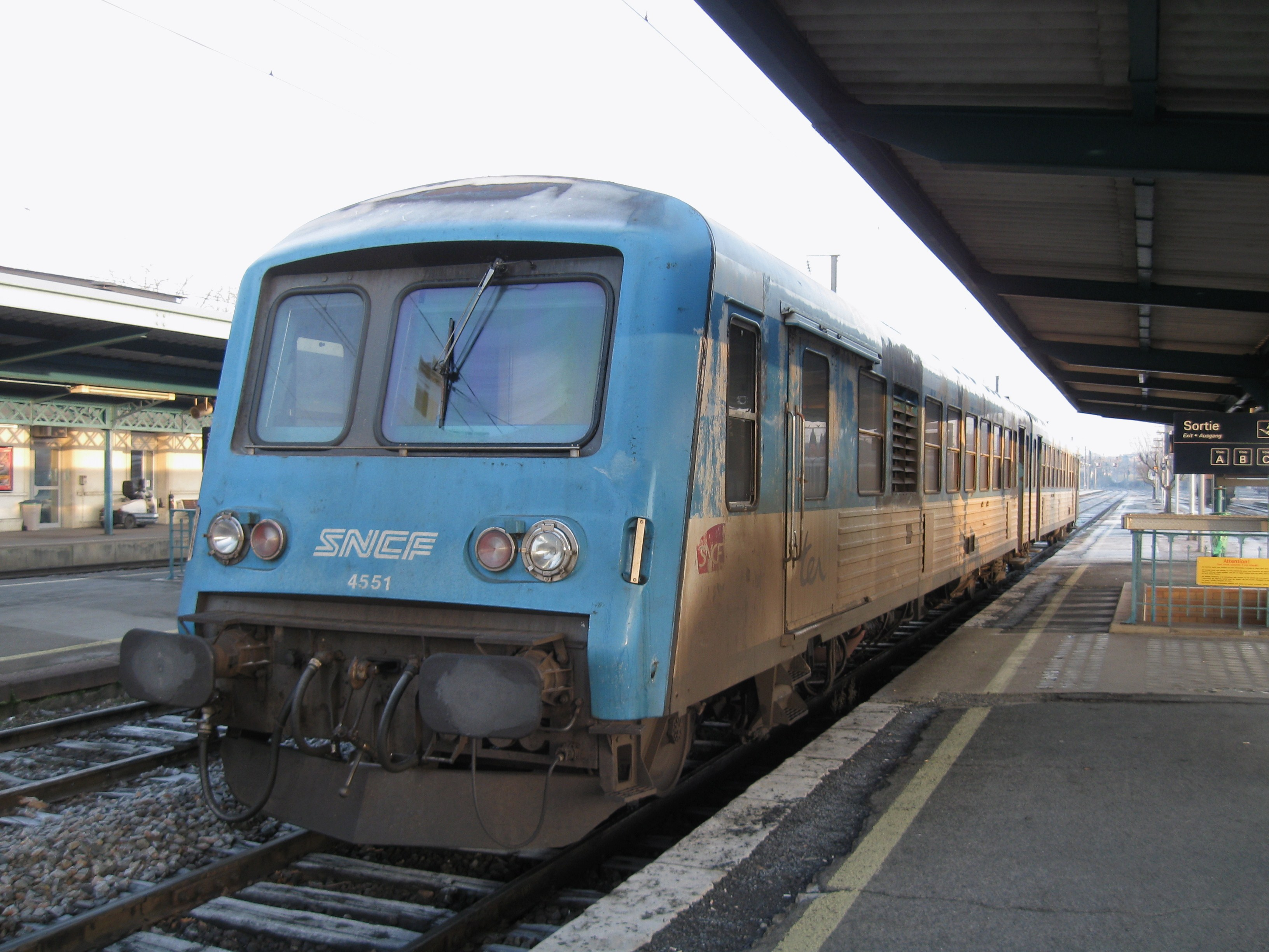 Rame automotrice diesel TER (4551) en mauvais état extérieur, gare de Moulins, Allier, France